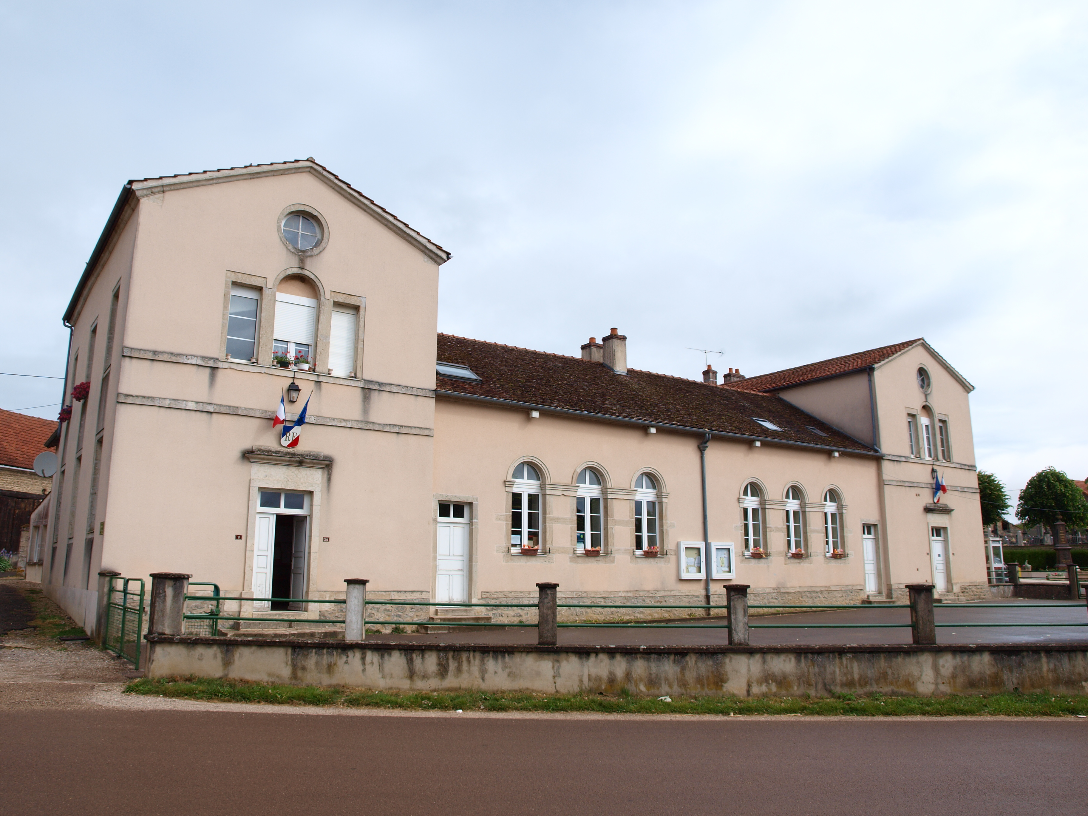 Sur les deux communes de Meilly-sur-Rouvres et de Rouvres-sous-Meilly